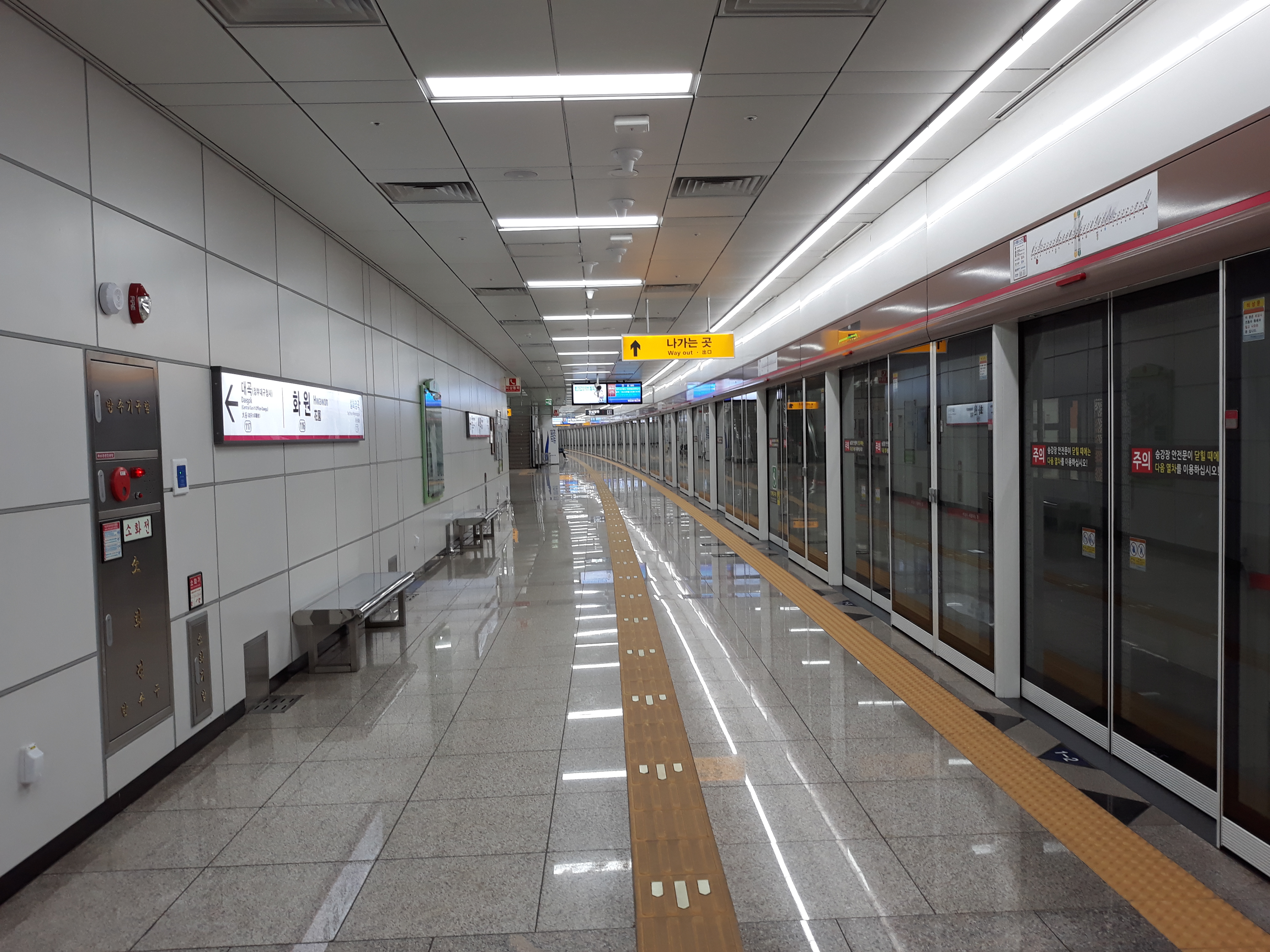 대구 도시철도 1호선 화원역 안심 방면 승강장